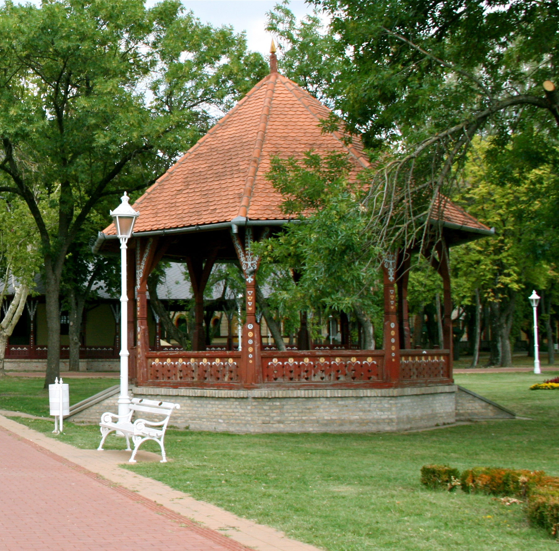 Музички павиљон на Палићу